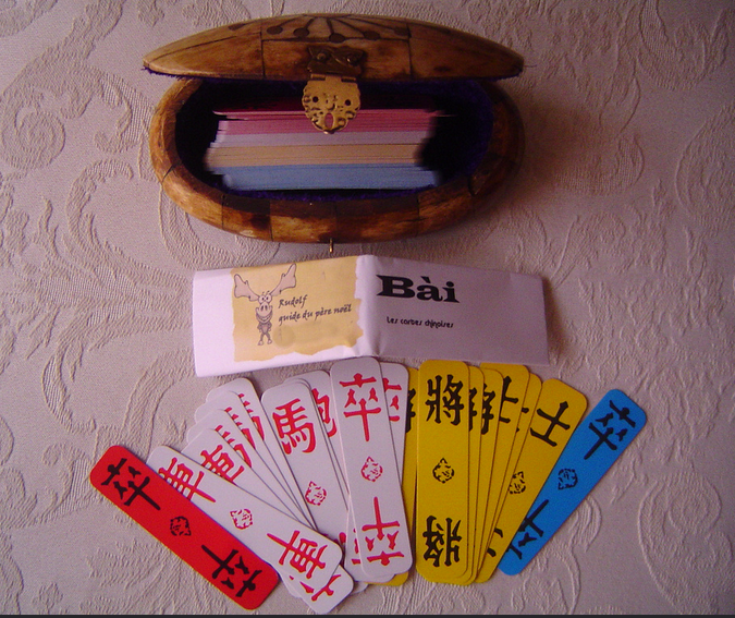 retouche de l'image de Wikipedia, sans le numéro de téléphone qui apparaissait sur le papier. Ce numéro n'est plus actif (apperemment la société n'existe plus et le téléphone est réattribué).